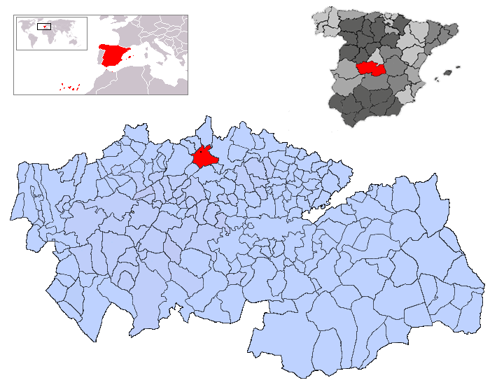 Escalona en la provincia de Toledo